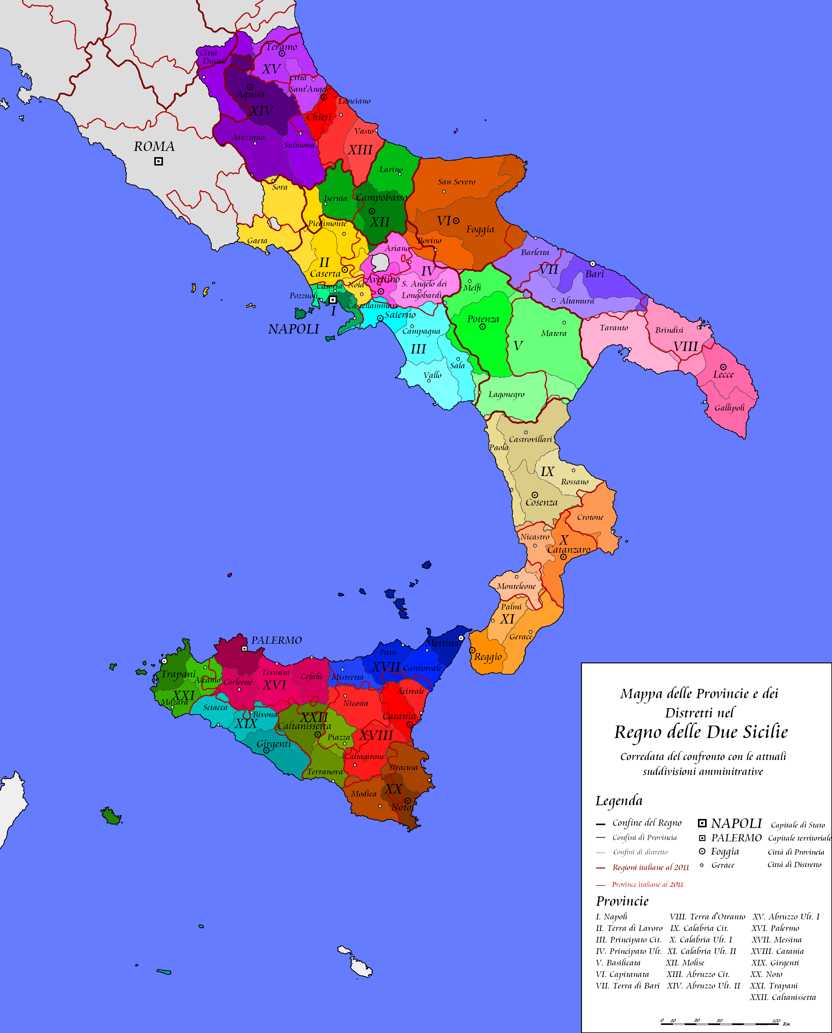 Mappa delle Provincie e dei Distretti del Regno delle Due Sicilie (ante 1860), in relazione con l'attuale (2011) suddivisione amministrativa di Regioni e Province.